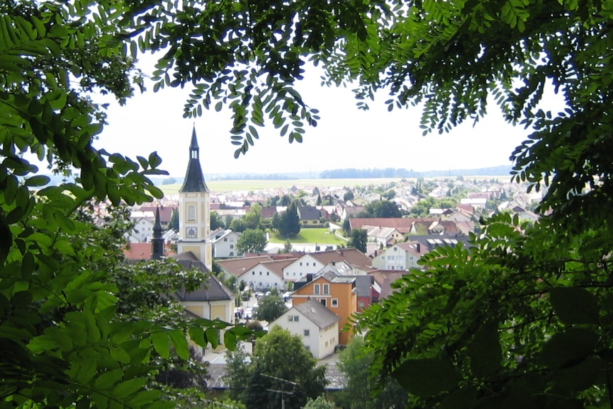 Ergoldsbach - Blick vom Kapellenberg